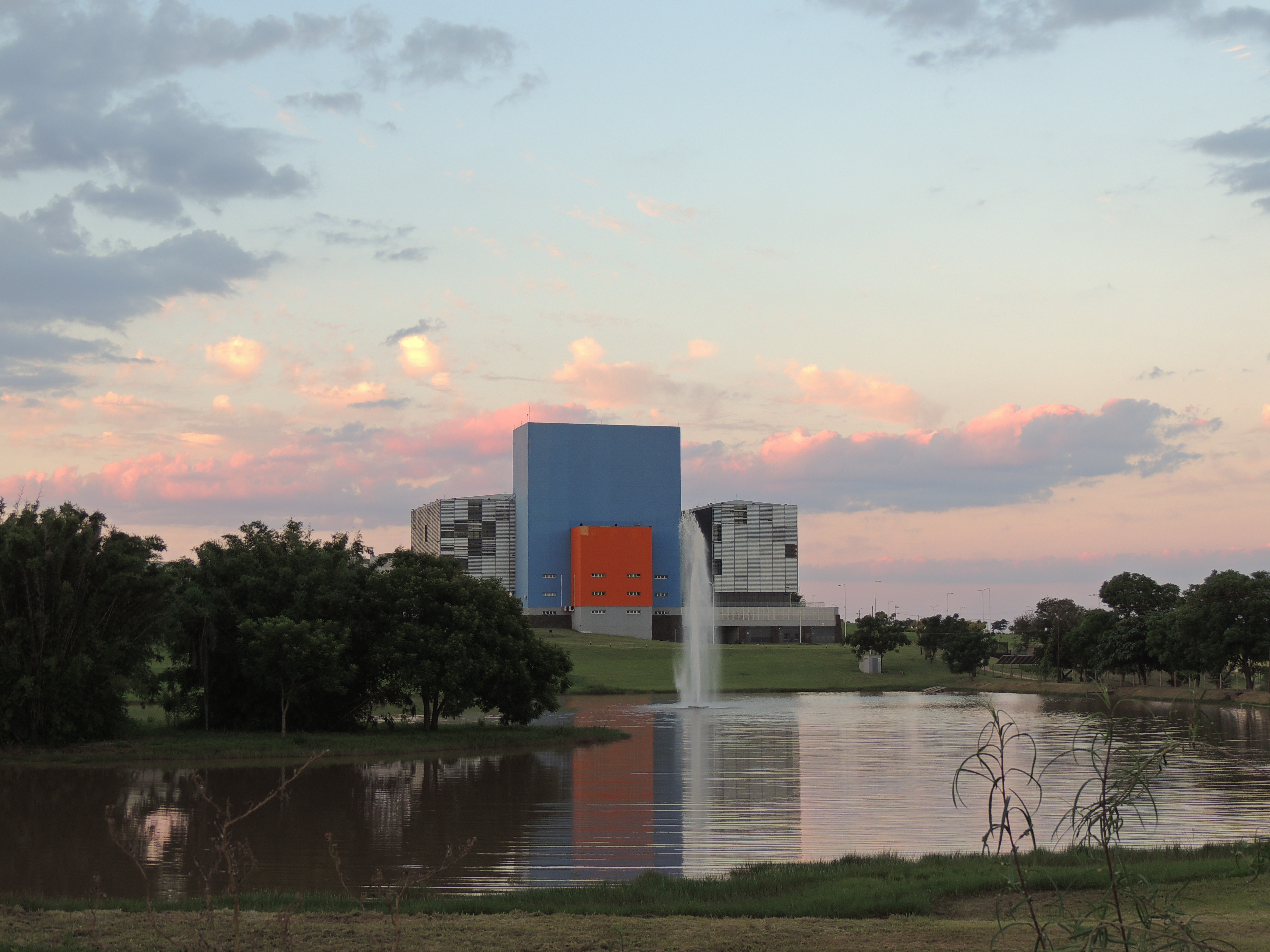 Espacio publico dedicado a la difusión de cultura